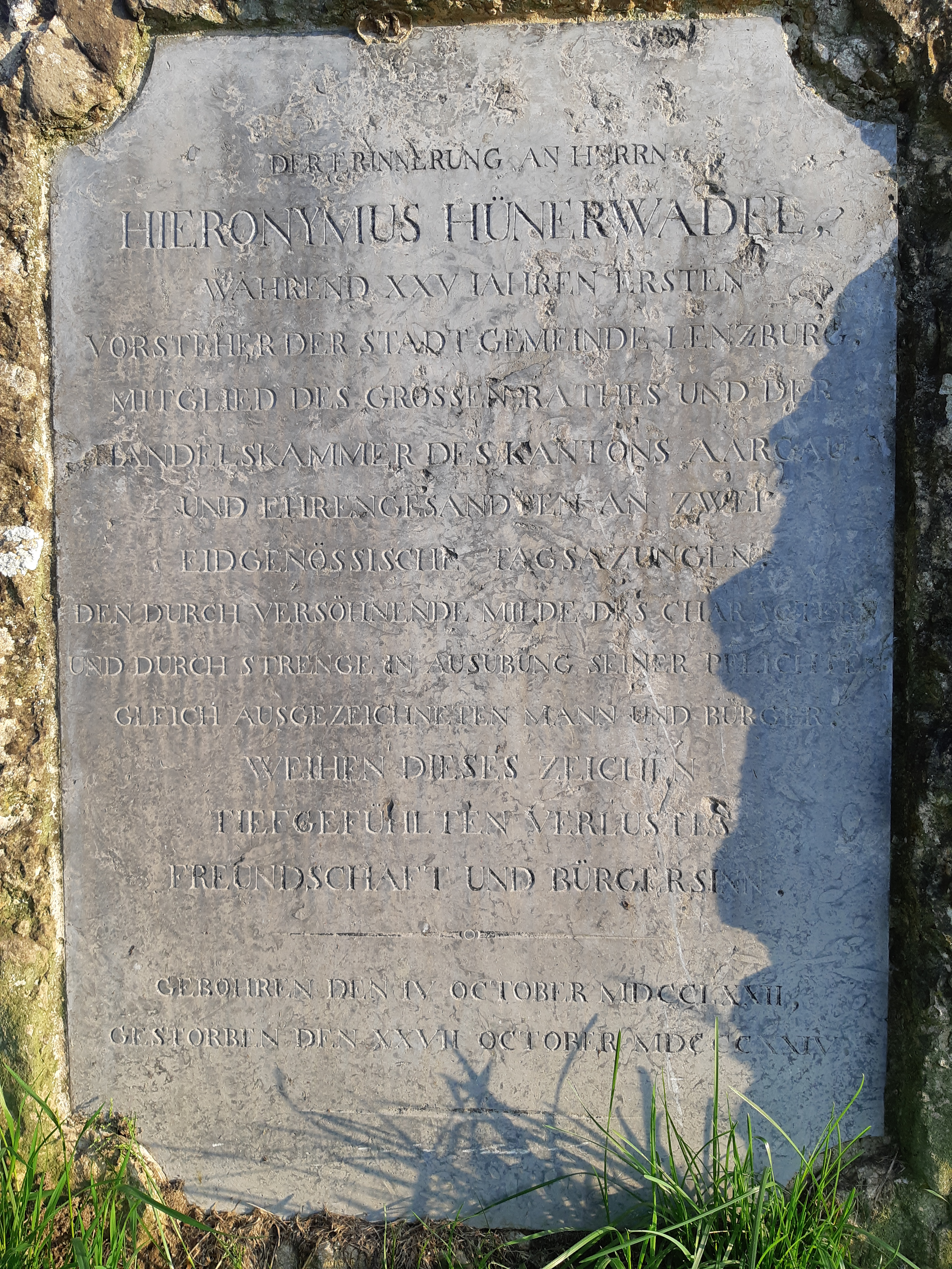 Gedenkstein Hieronymus Hünerwadel in Lenzburg, (Switzerland)